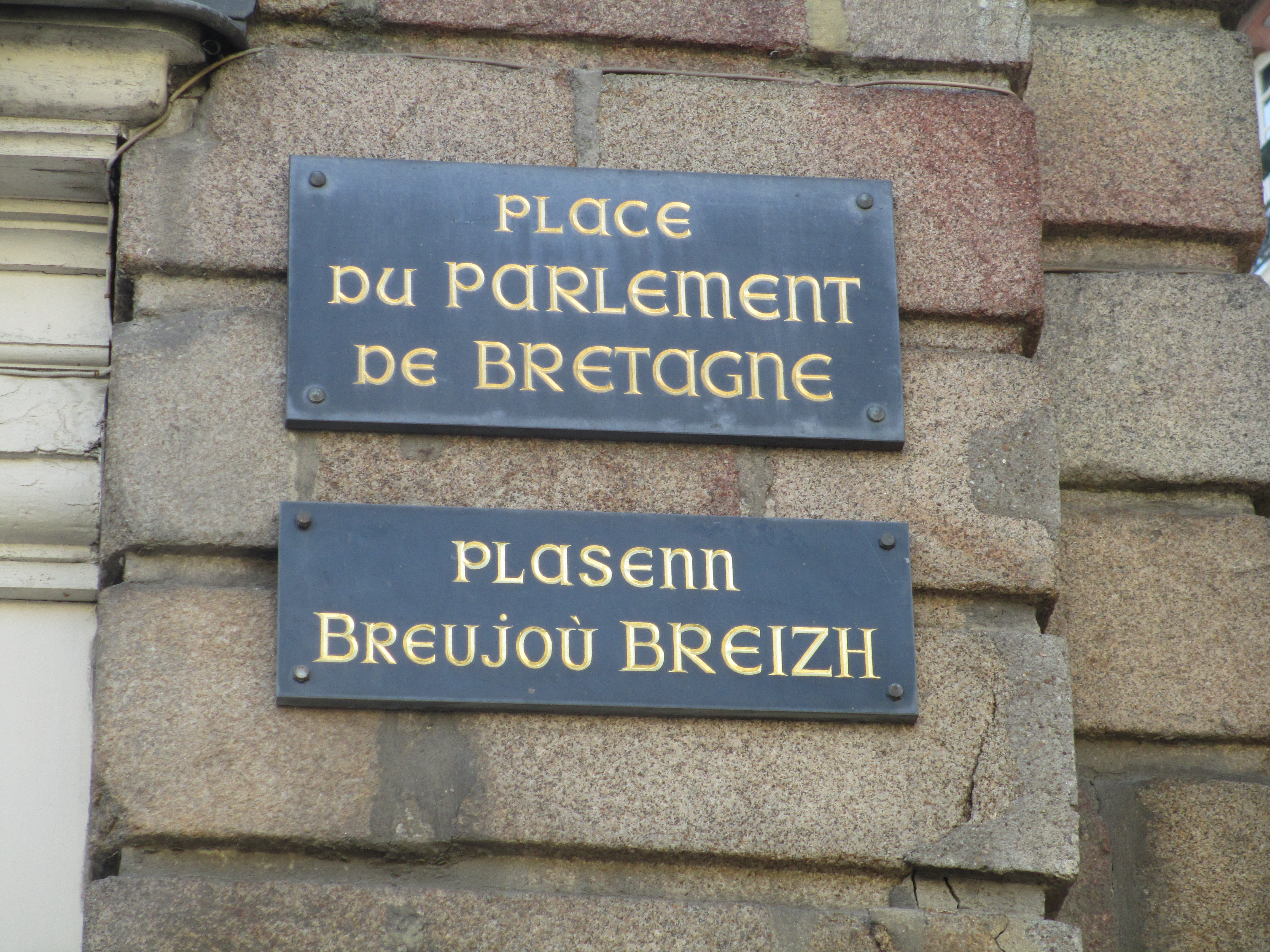 שלטי רחוב בצרפתית וברטונית ברן